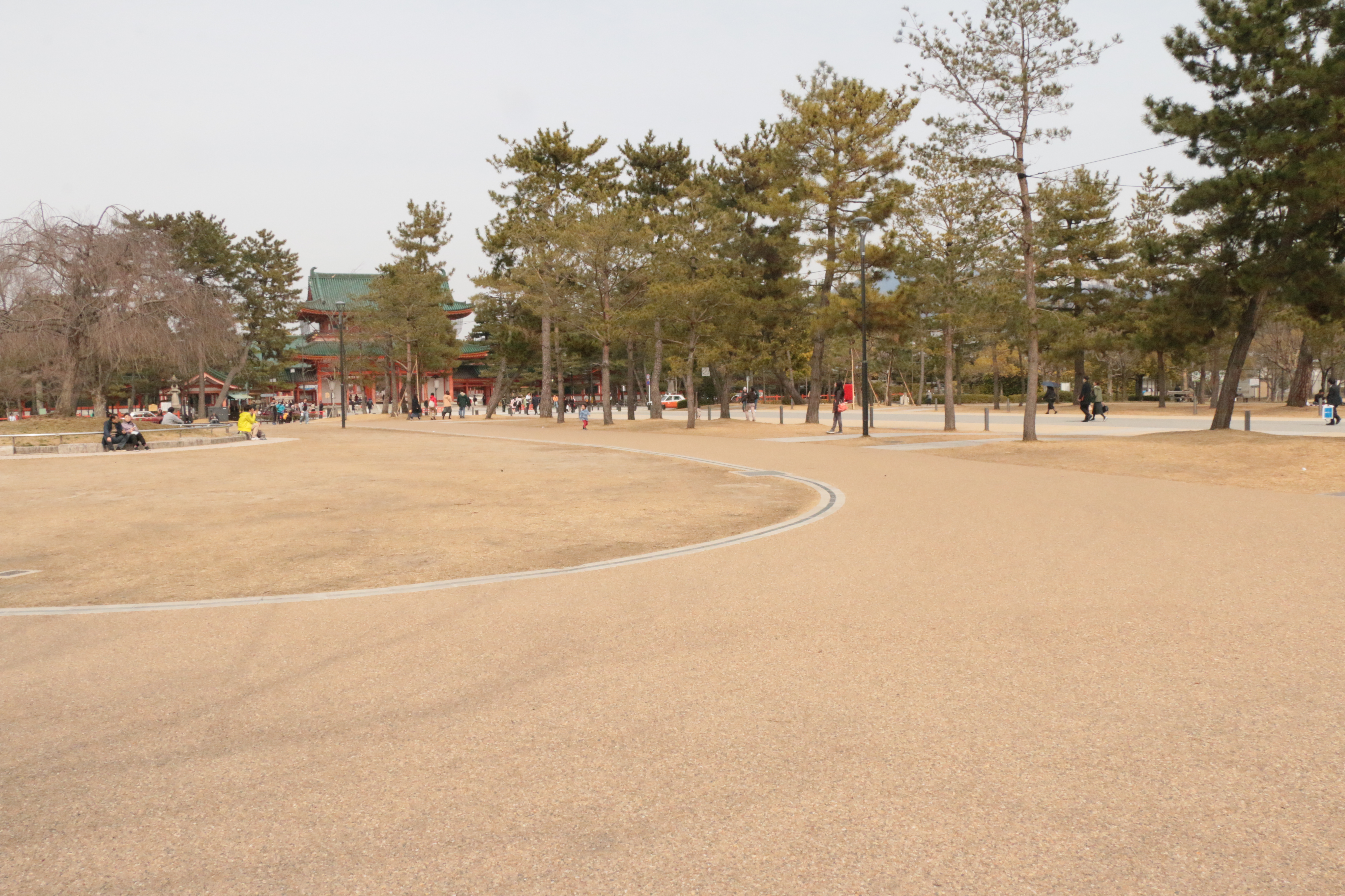 岡崎公園の広場